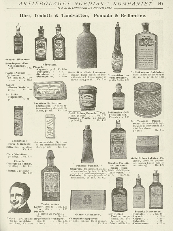 Katalog vintern 1905-1906. AB Nordiska Kompaniet, Stockholm. Hår-, Toalett- & Tandvatten, Pomada & Brilliantine.